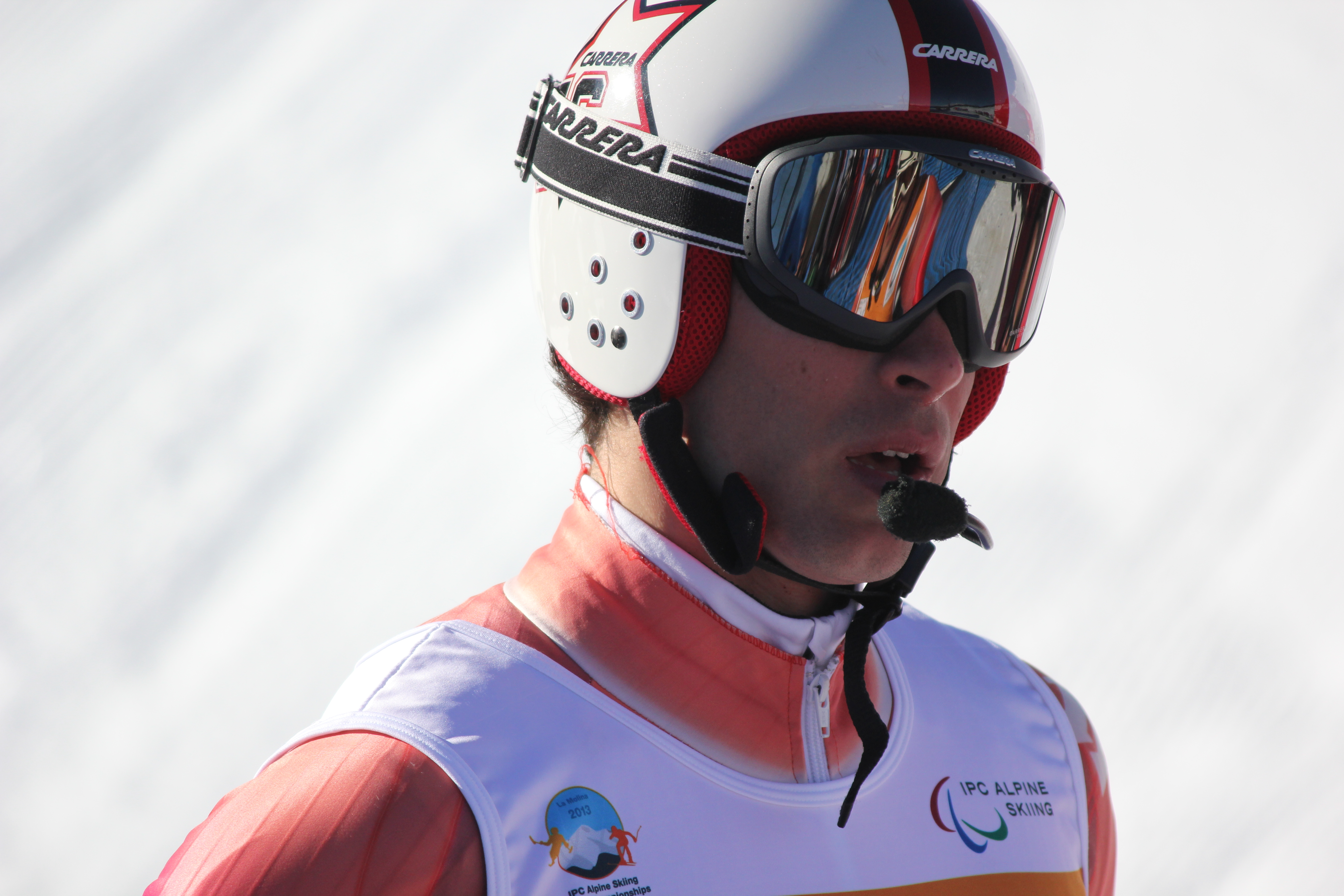 Gabriel Gorce tras cruzar la meta en la prueba de descenso de los Campeonatos del Mundo 2013 IPC de La Molina, España.